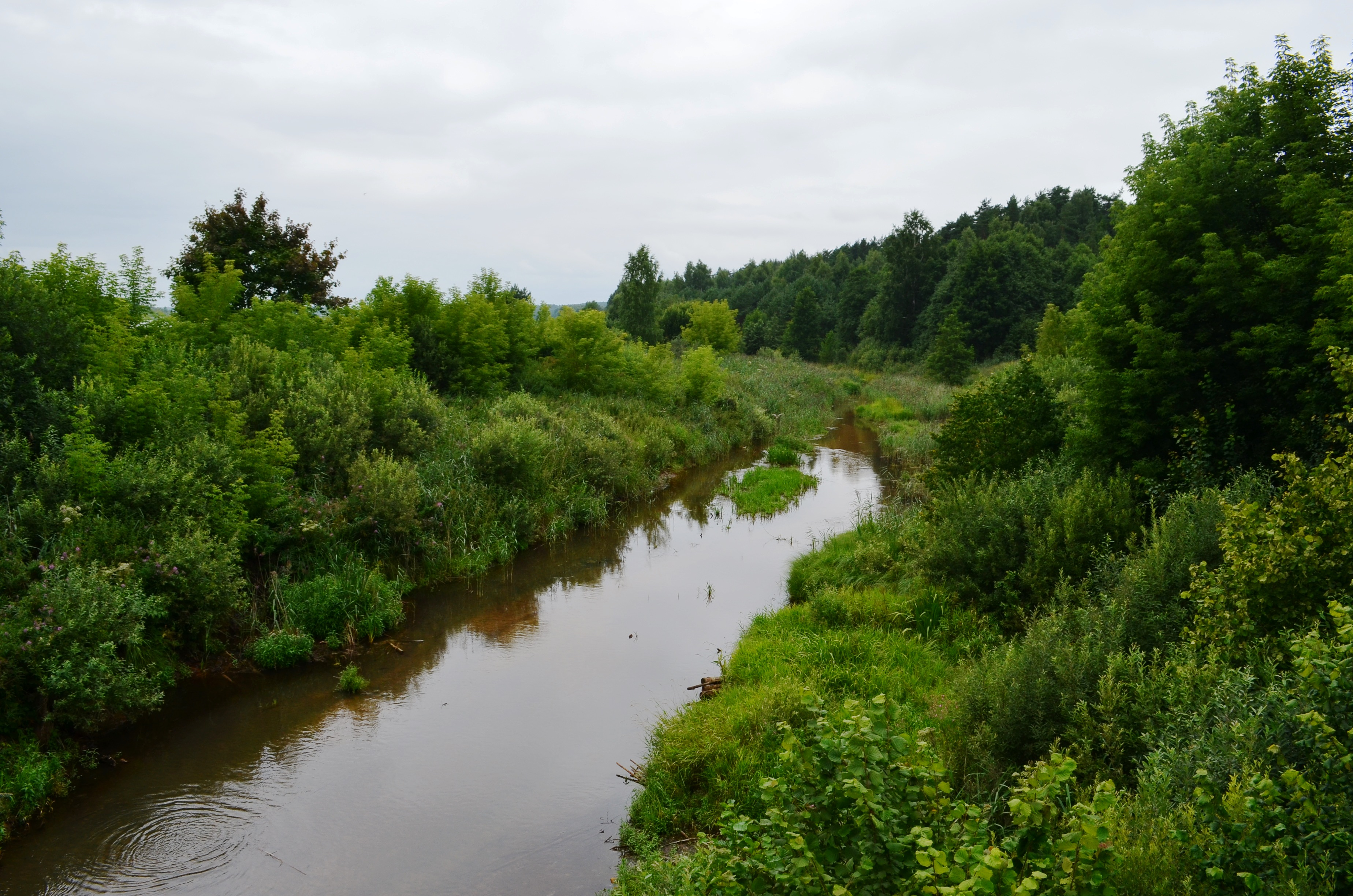 Audros upė tarp Čivylių ir Petrešiūnų, Rokiškio r.